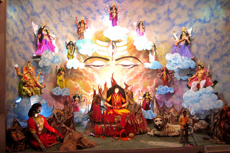 Lors de la fête de Navaratri, de nombreuses manifestations mettent en scène les neuf déesses. Ici, Bénares.